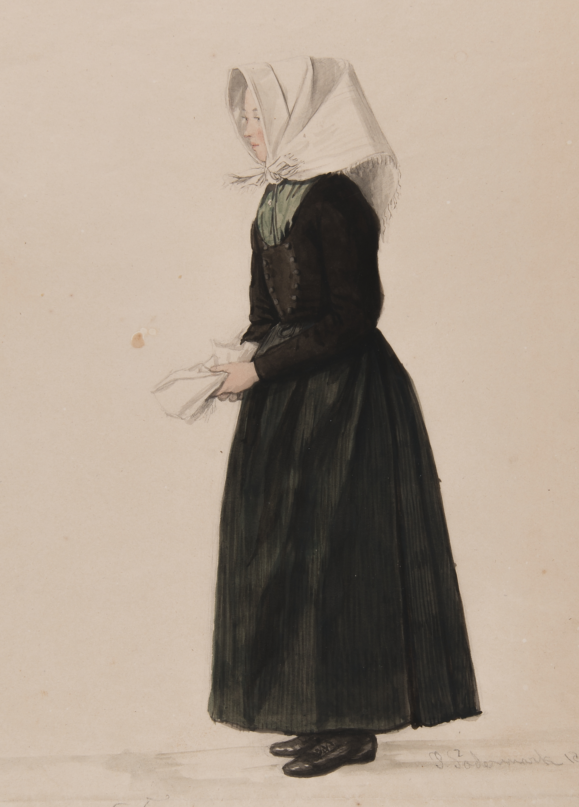 Kvinna i dräkt. Akvarell av P.Södermark. Depicted place: Stora Tuna socken (Q10681133)